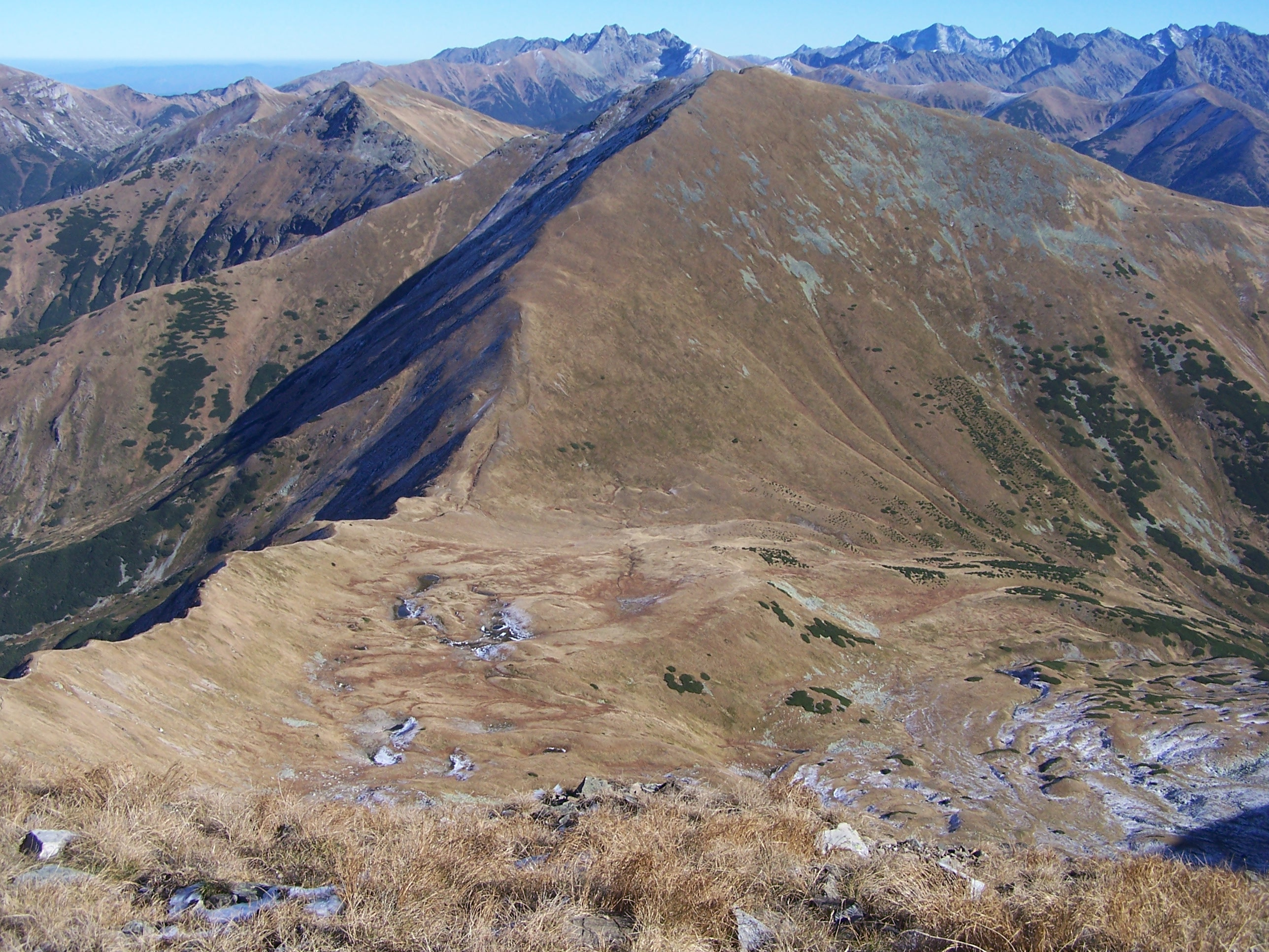 Pyszniańska Przełęcz. Widok z Błyszcza. Ponad przełęczą Kamieniasta, dalej Smreczyński Wierch, u góry Tatry Wysokie.